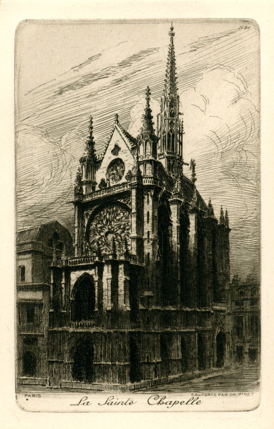 Paris, La Sainte-Chapelle - eau-forte de Charles Pinet (série PARIS n° 31)